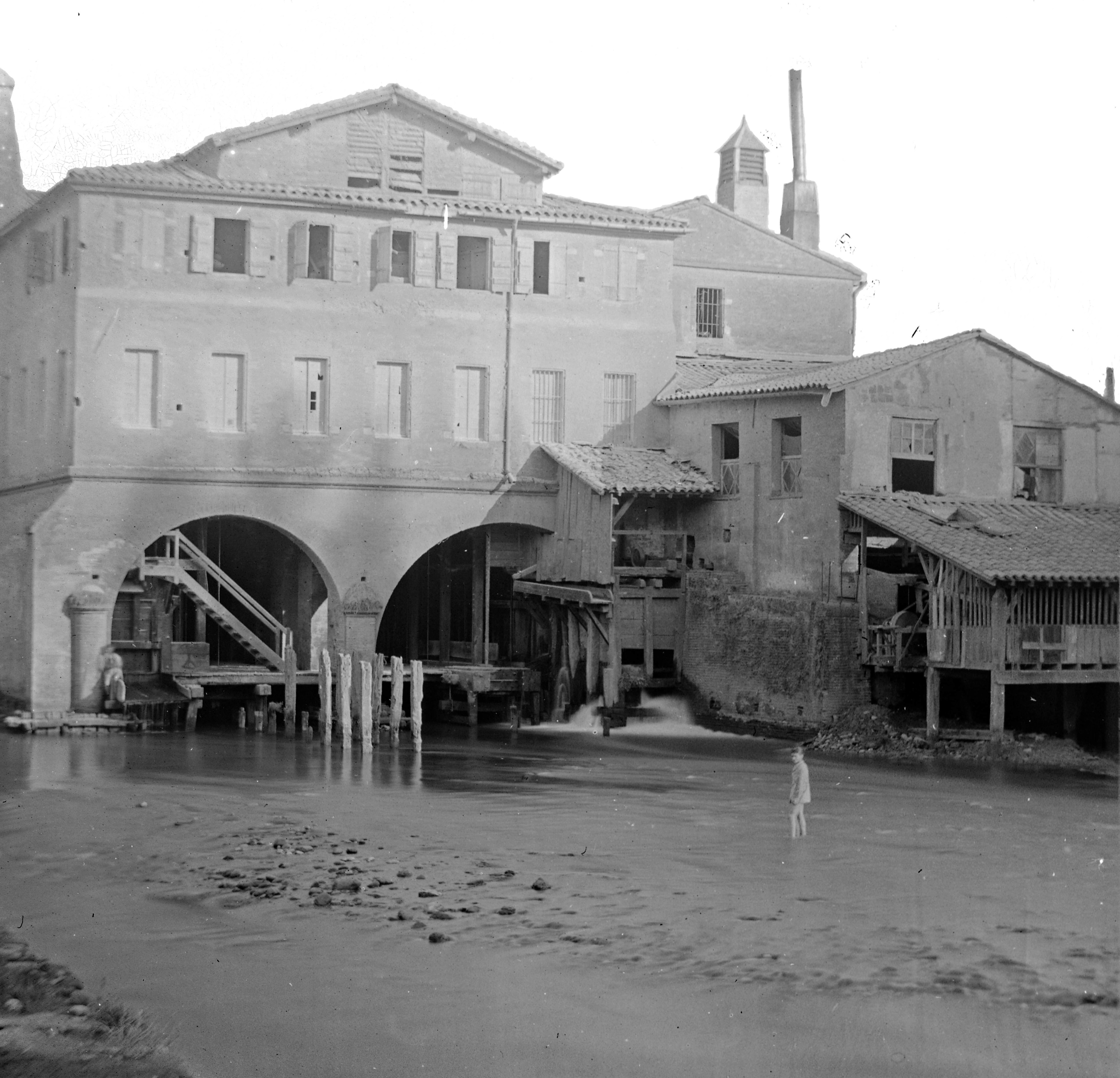 plaque négative stéréoscopique au collodion format 8,5x17cm. Sans inscription ni mention d'auteur Toulouse